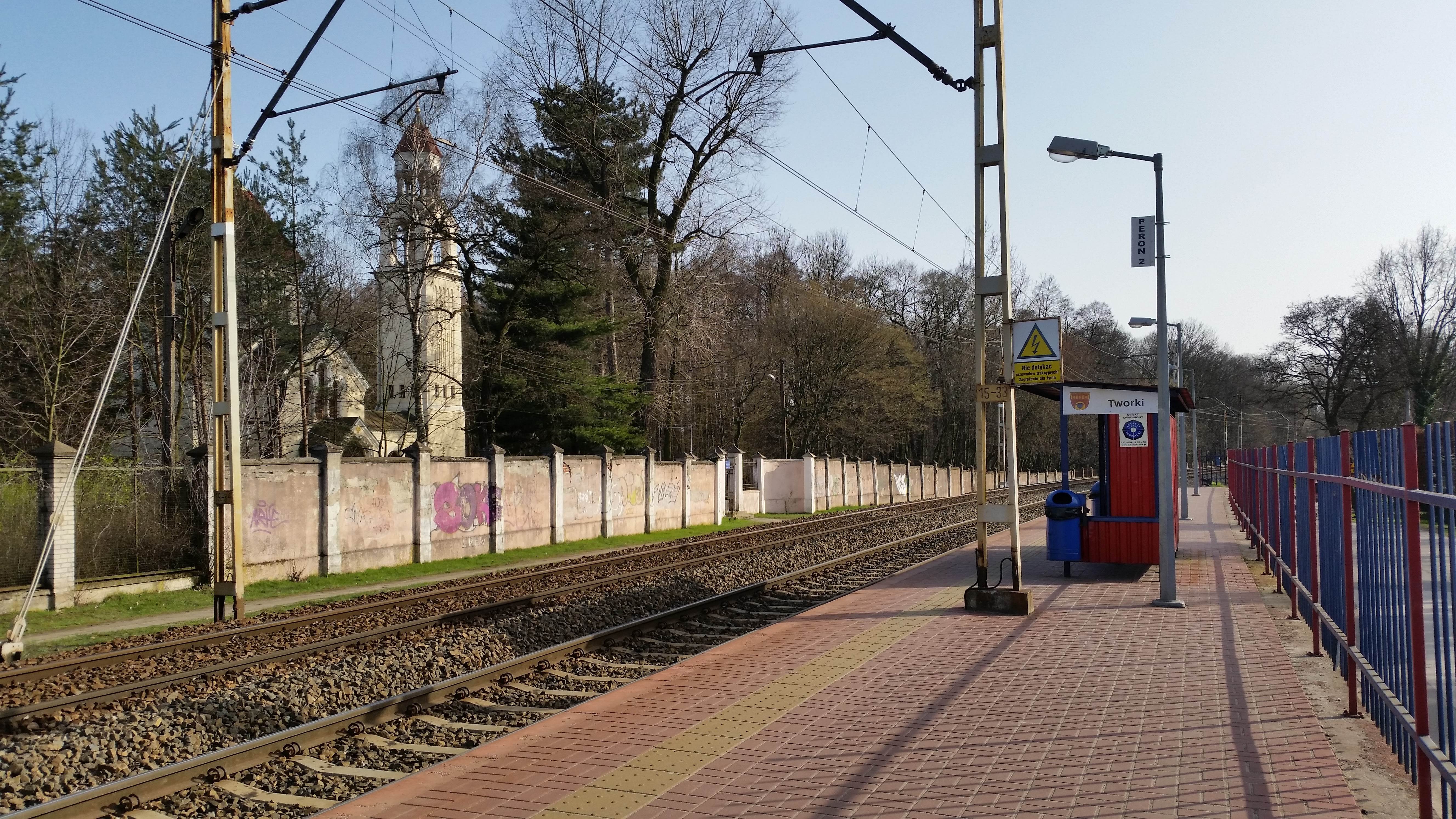 Peron Tworki WKD, z którego odjeżdżają pociągi w stronę Grodziska Mazowieckiego. W tle po lewej stronie widać kościół Przemienienia Pańskiego w Pruszkowie.